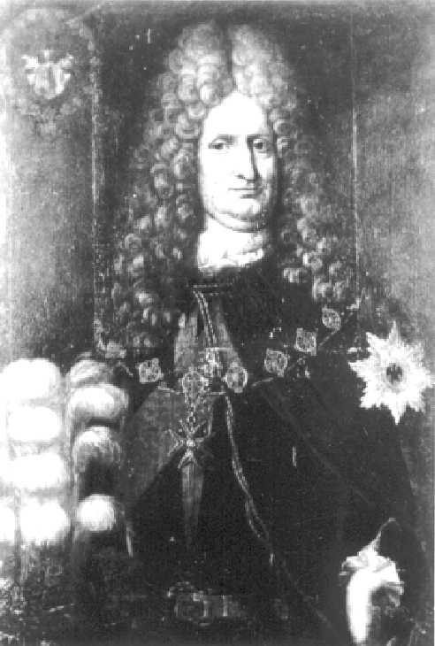 Otto Wilhelm von Perbandt in Ritter des Schwarzen Adler-Ordens